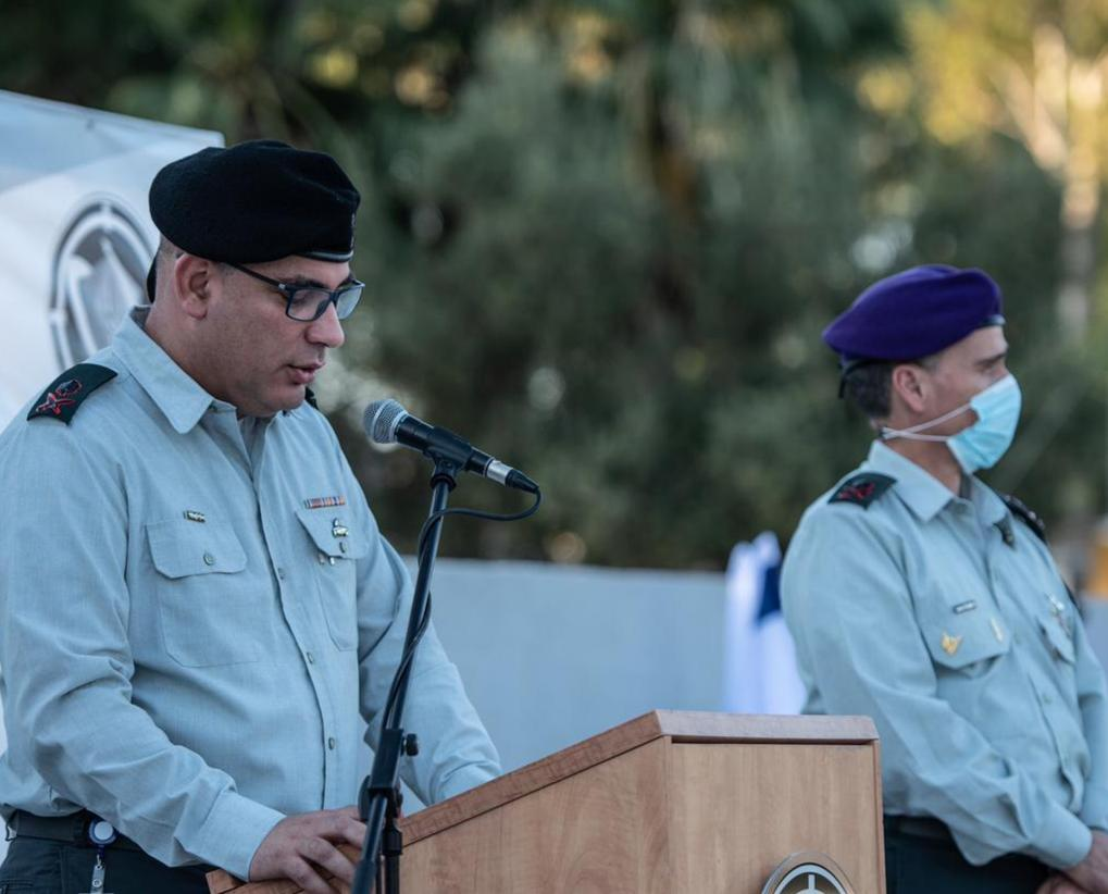 אתמול (ראשון), נערך טקס הקמת מערך התמרון המשולב הרב ממדי, בראשות מפקד זרוע היבשה, אלוף יואל סטריק, מפקד מערך התמרון הנכנס ומפקד הגיס הצפוני, אלוף יעקב בנג'ו, מפקדי חילות זרוע היבשה ומפקדים נוספים במחנה בר-לב.